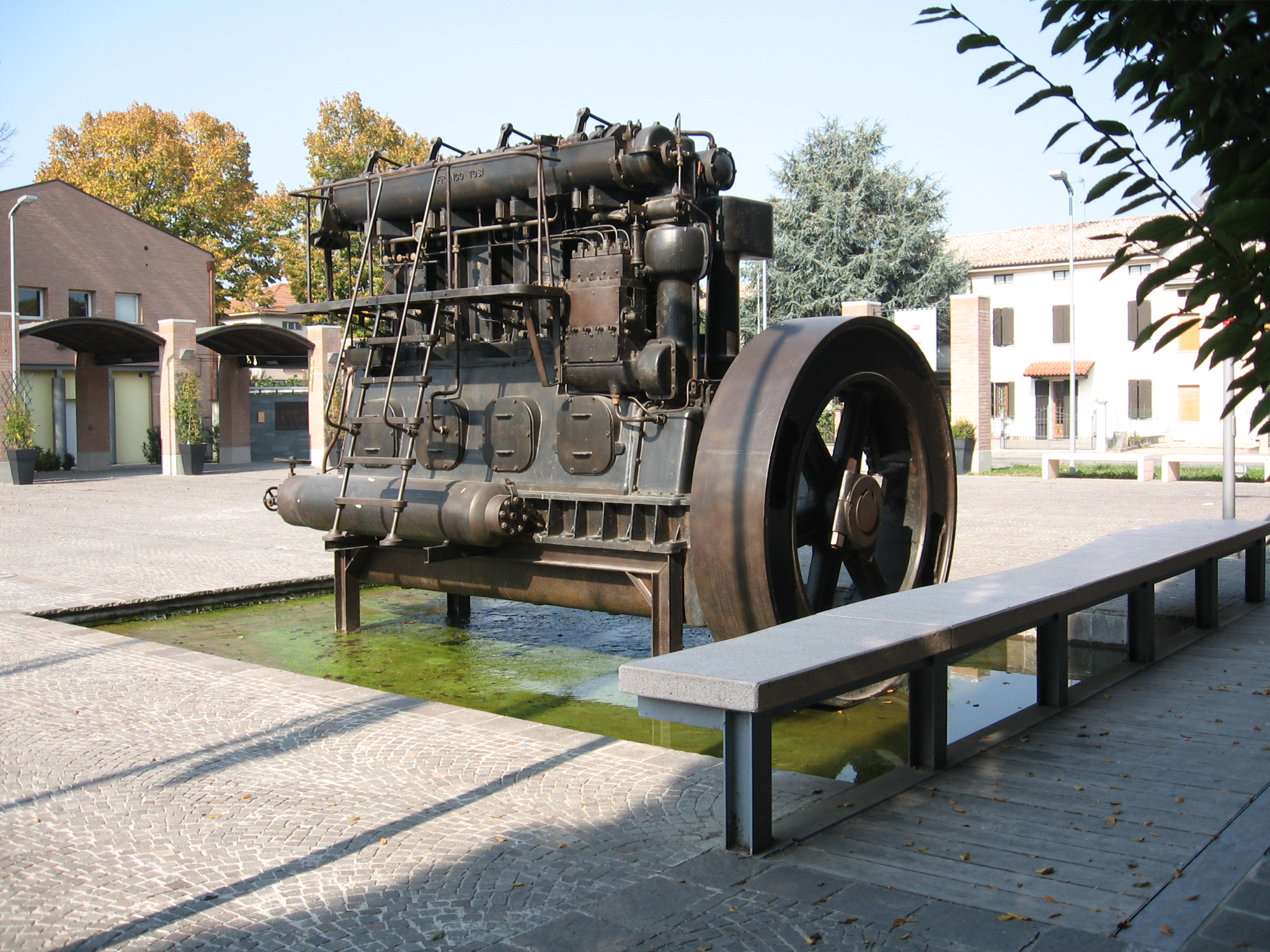 Mezzano Inferiore, la vecchia idrovora